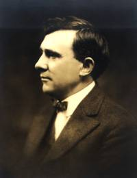 Bibb Graves (1873-1942)